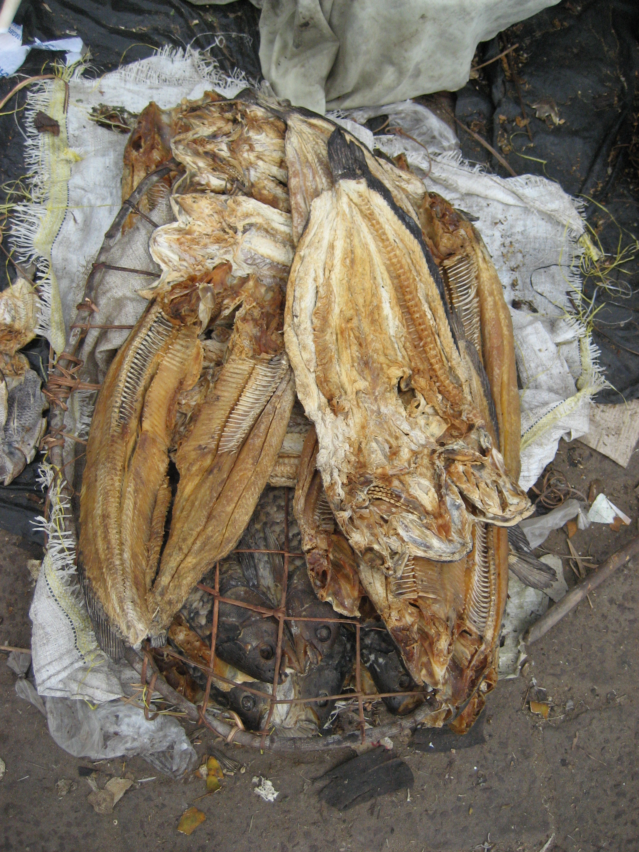 Poisson séché vendu sur le marché fluvial d'Oyo, République du Congo.